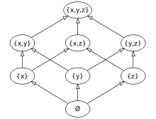 Διάγραμμα Χασε